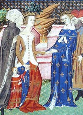 Isabela Francouzská s bratrem a synem